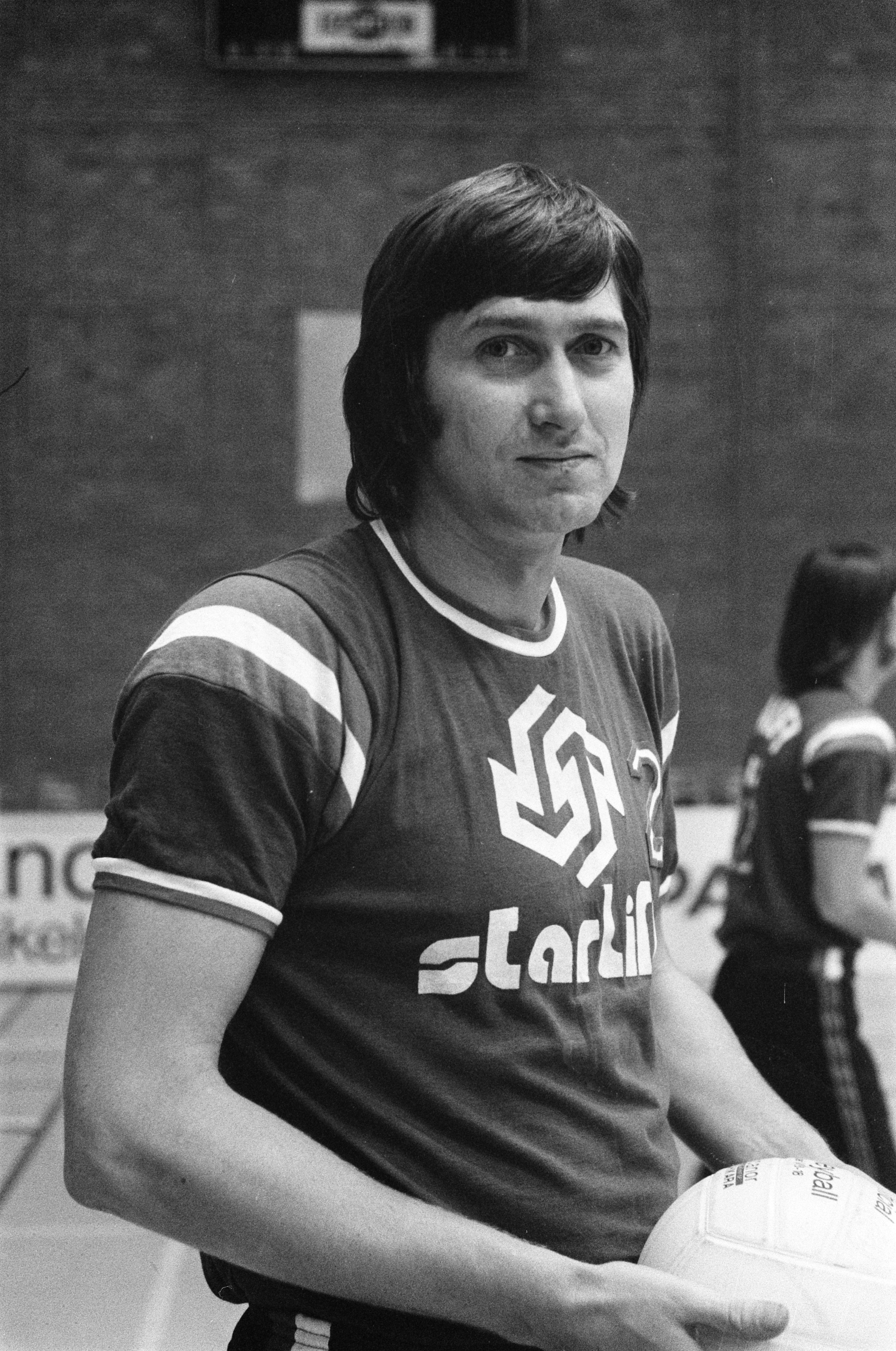 Collectie / Archief : Fotocollectie Anefo Reportage / Serie : Halve finale Europacup volleybal te Rijswijk: Starlift Blokkeer tegen AZS Olsztyn (Polen) Beschrijving : Frank Constandse Datum : 9 februari 1974 Locatie : Rijswijk, Zuid-Holland Trefwoorden : portretten, sport, volleybal Persoonsnaam : Constandse, Frank Instellingsnaam : Europacup, Starlift/Blokkeer Fotograaf : Rob Croes / Anefo Auteursrechthebbende : Nationaal Archief Materiaalsoort : Negatief (zwart/wit) Nummer archiefinventaris : bekijk toegang 2.24.01.05 Bestanddeelnummer : 926-9937